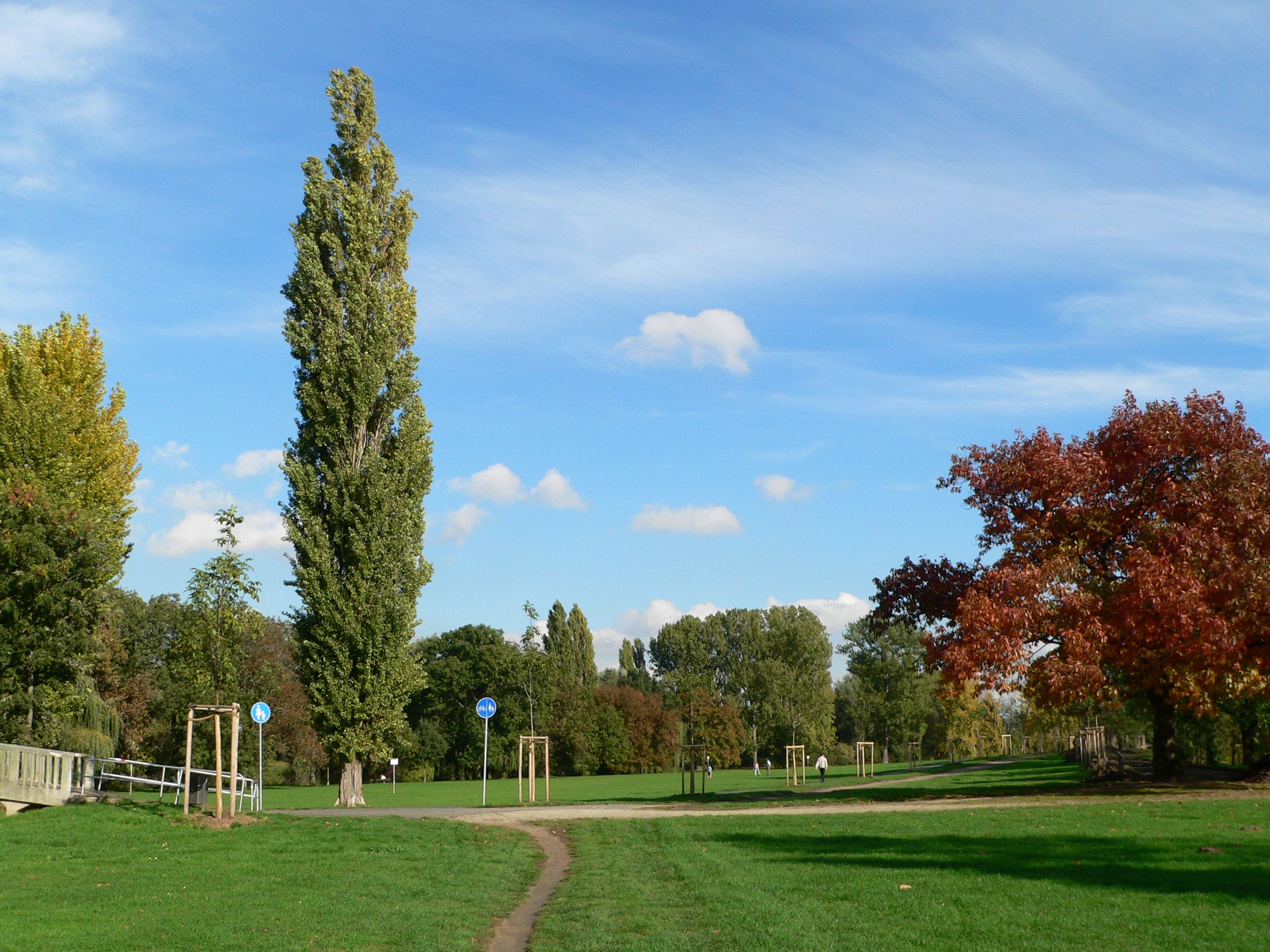 Wörthspitze in Frankfurt-Höchst